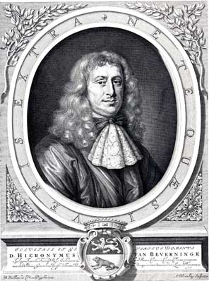 Hiëronymus van Beverningh, staatsman in de zeventiende eeuw, geboren te Gouda